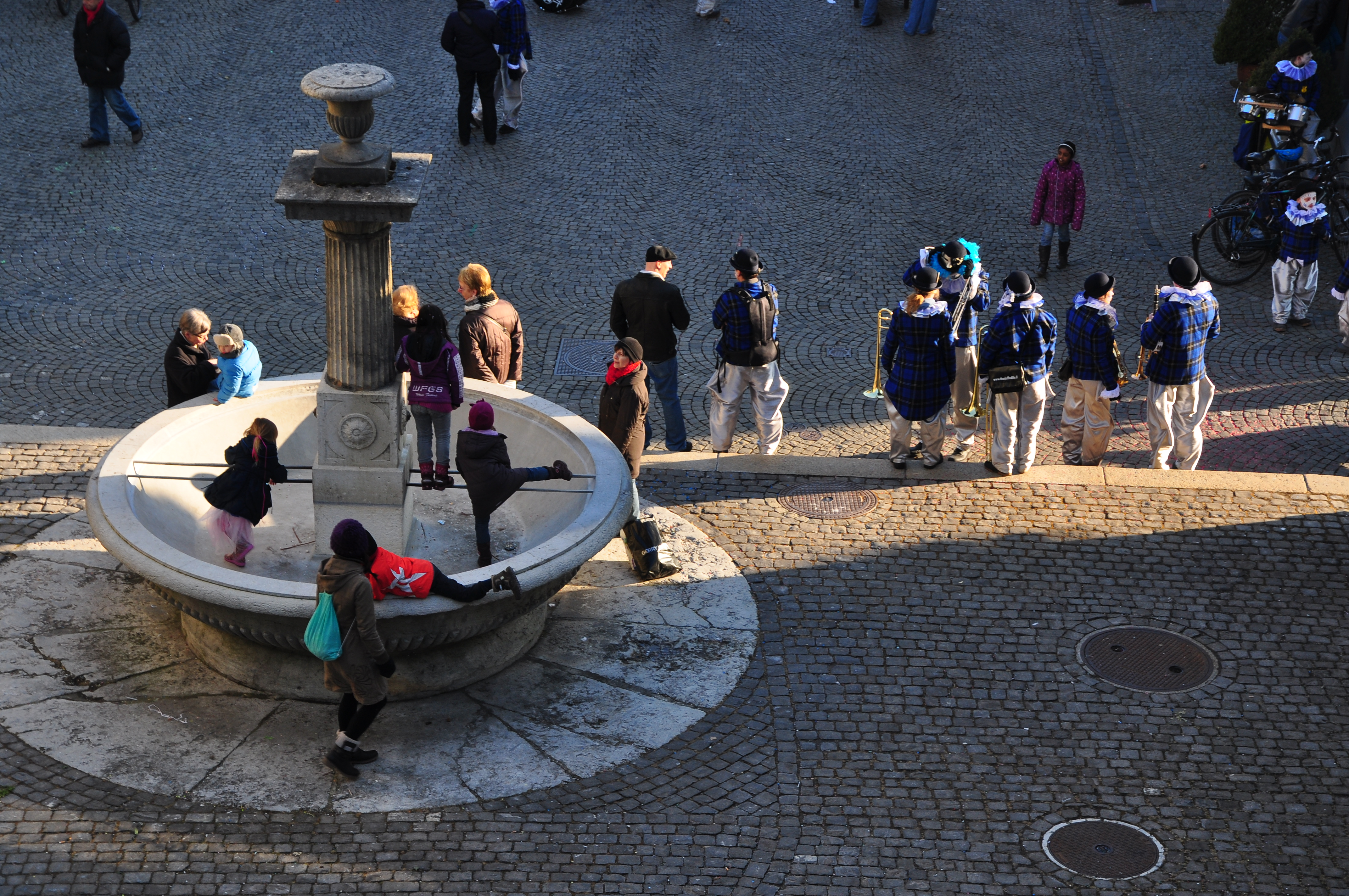 Eis-zwei-Geissebei, Rathaus respectively Hauptplatz square in Rapperswil (Switzerland)